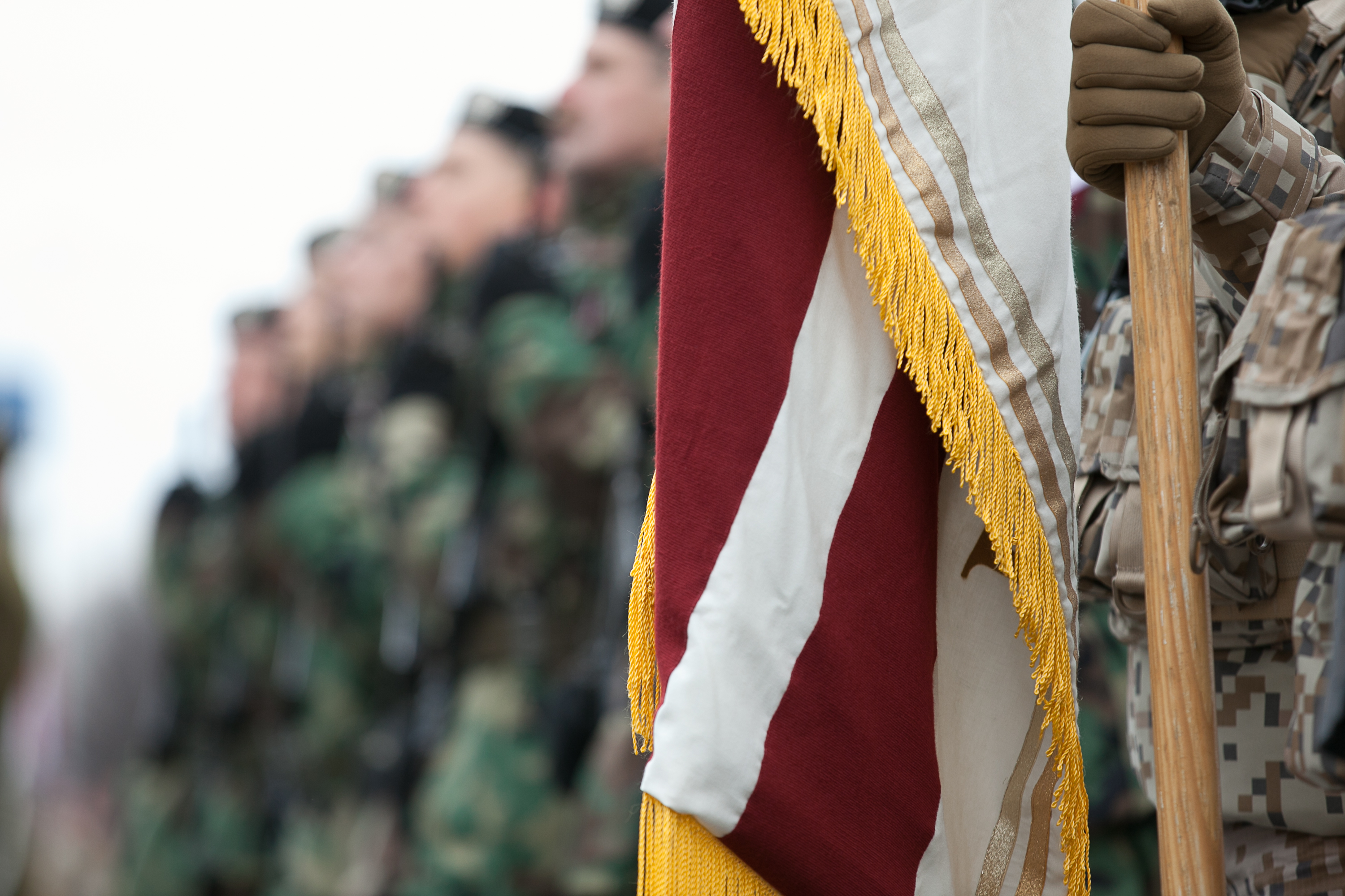 2011.gada 18.novembris. 11.novembra krastmalā notiek svinīgā Nacionālo Bruņoto spēku parāde. Foto: Ernests Dinka, Saeimas Kanceleja